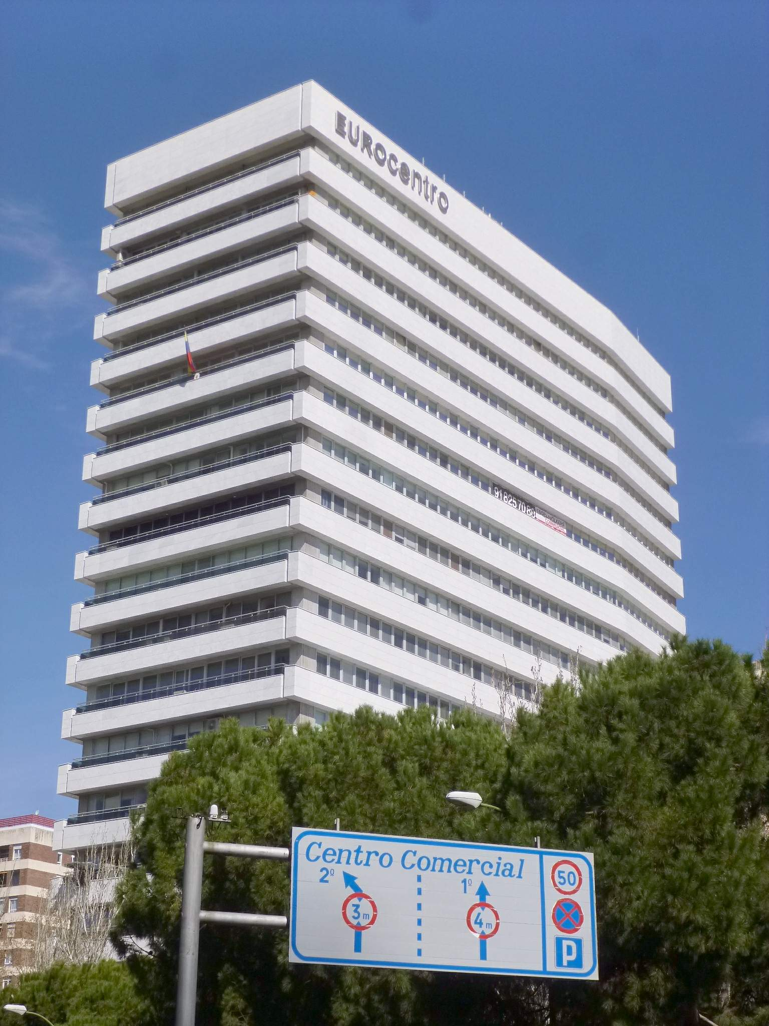 Madrid - Edificio Eurocentro (aloja la Embajada de Venezuela en España)